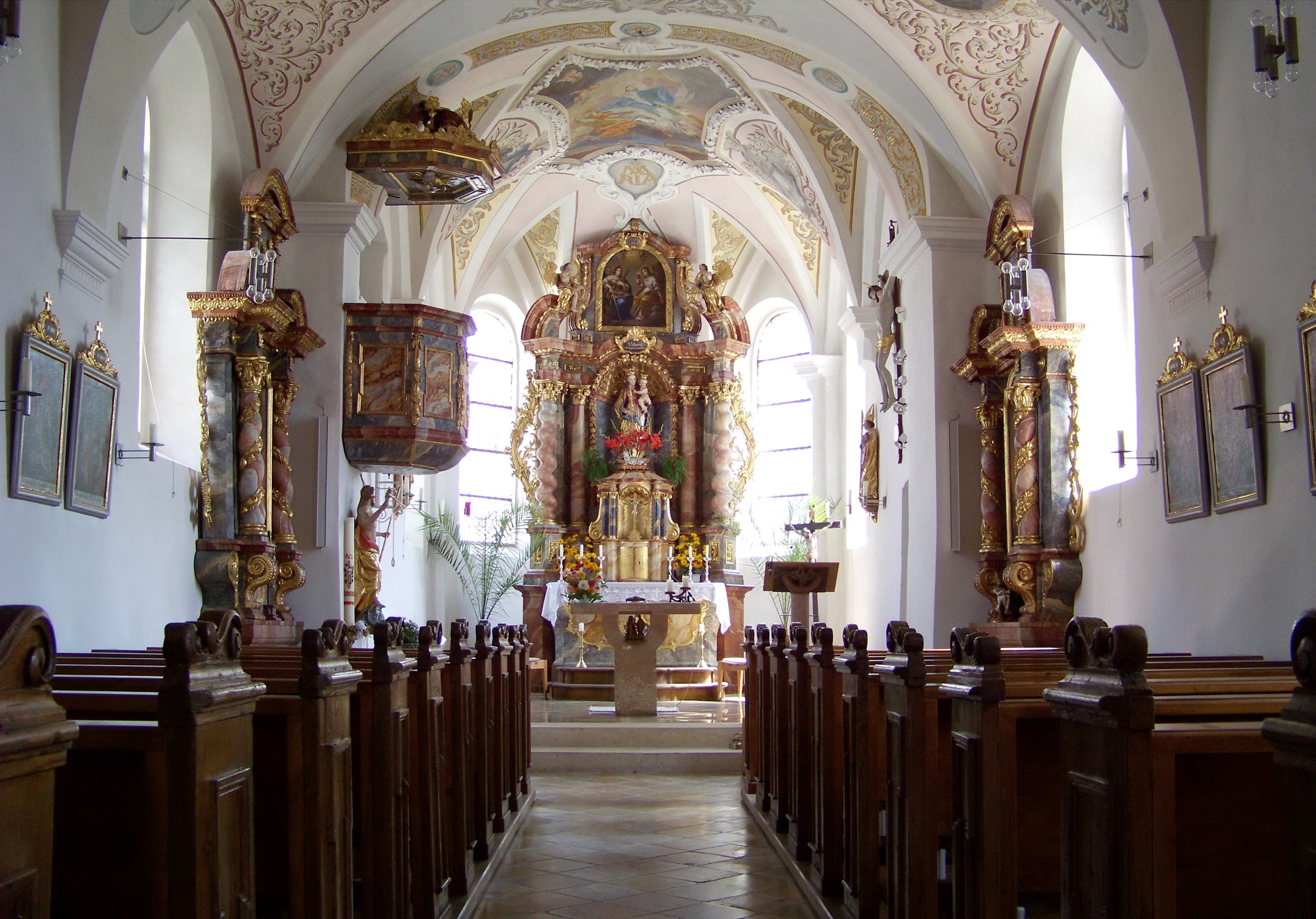 Herrngiersdorf, Semerskirchen, Am See 1. Katholische Pfarrkirche Mariä Himmelfahrt. Der einschiffige Saalraum mit barockem Kreuzgewölbe ist in drei Joche gegliedert. Der Chor ist leicht eingezogen und schließt dreiseitig. Die barocken Altäre mit ihren korinthischen Säulen harmonieren mit der Deckenmalerei und dem Rahmenstuck. Eine schöne Muttergottesstaue mit Kind um 1600 bekrönt den hohen Tabernakelaufbau.